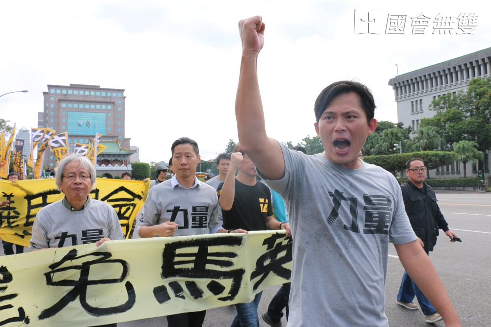 「時代力量」立委參選人黃國昌等人今早赴凱道抗議，於遊行過程中不斷高呼「罷免馬英九」。